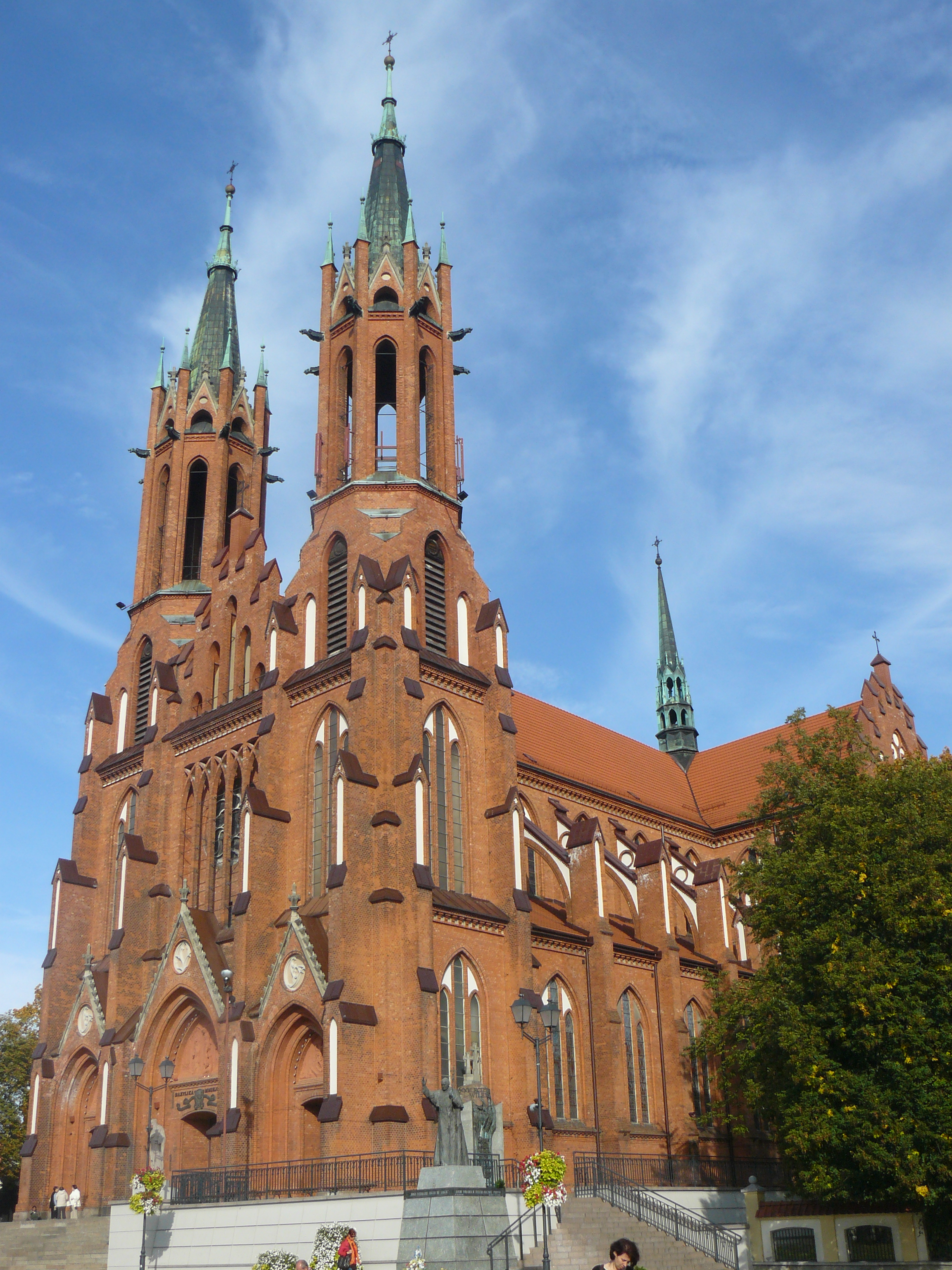 Białystok - Bazylika archikatedralna Wniebowzięcia NMP (zabytek nr A-192 z 28.01.1980)